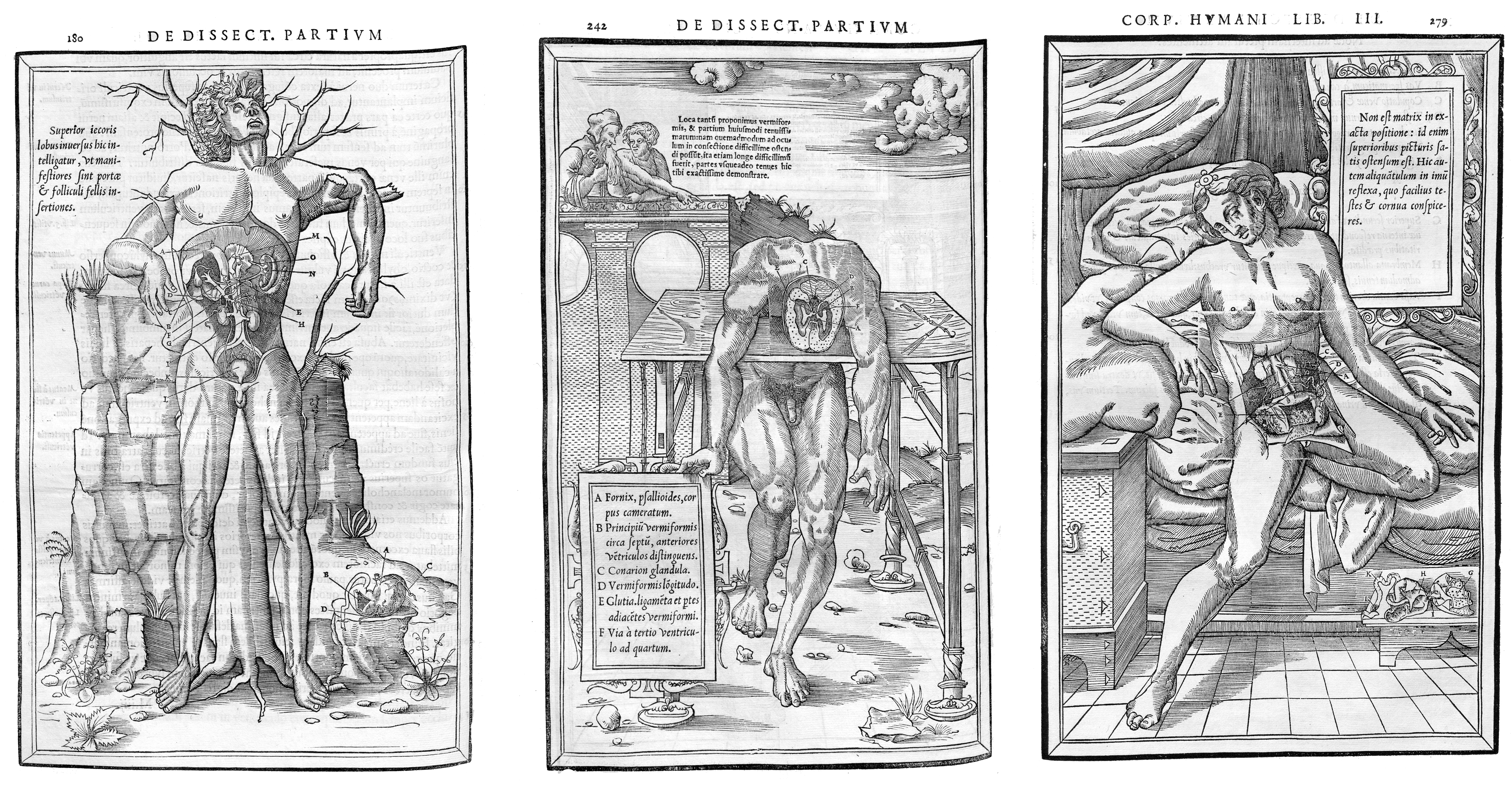 Drei Abbildungen aus dem Anatomiebuch von Charles Estienne